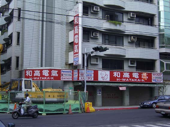 中文（台灣）: 和光電氣天母店。